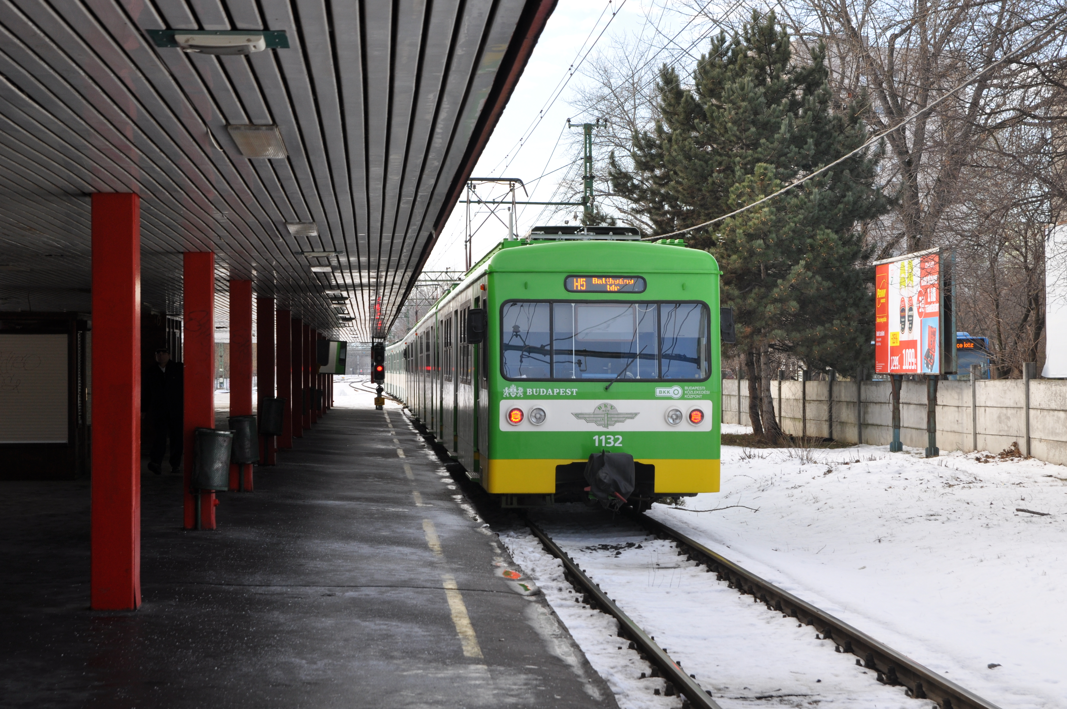 Békásmegyer, HÉV állomás